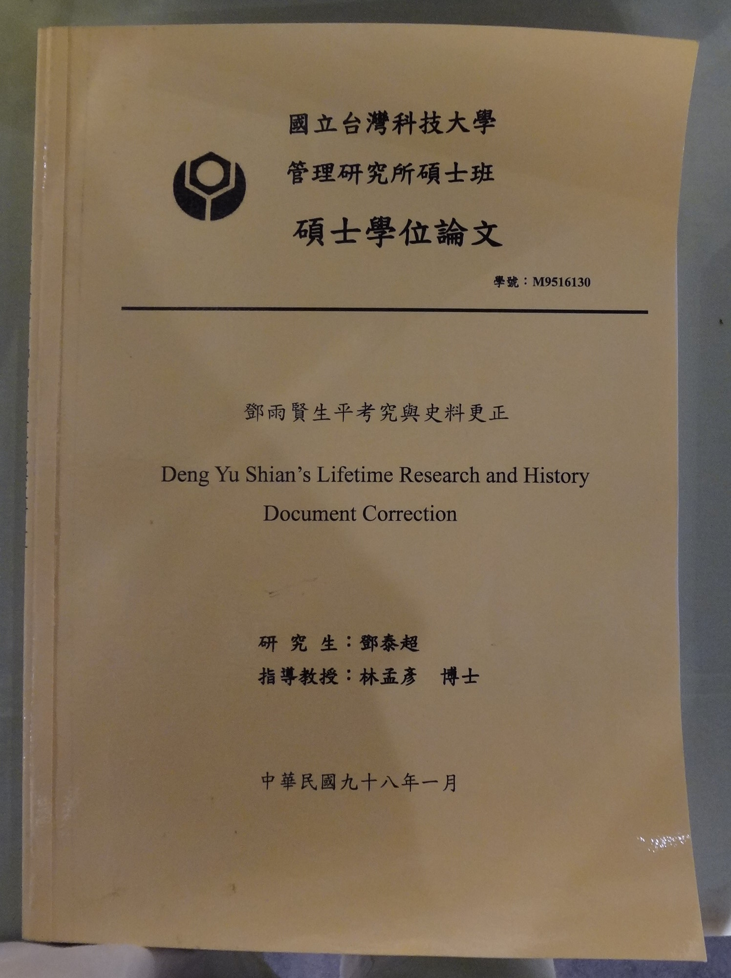 中文（台灣）: 2009年1月，國立臺灣科技大學管理研究所碩士班研究生鄧泰超（鄧雨賢之孫）碩士學位論文：《鄧雨賢生平考究與史料更正》。